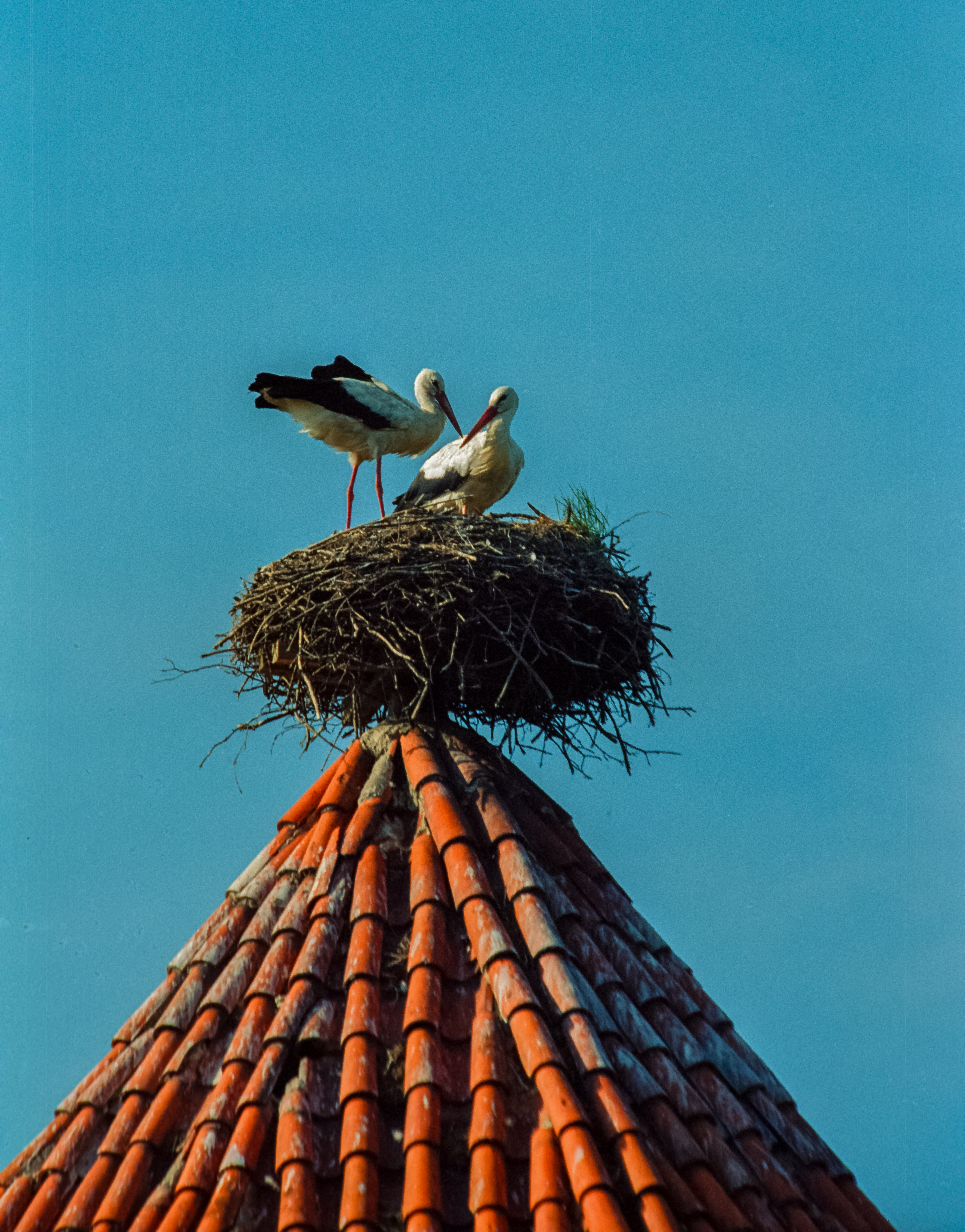 Szymbark Castle